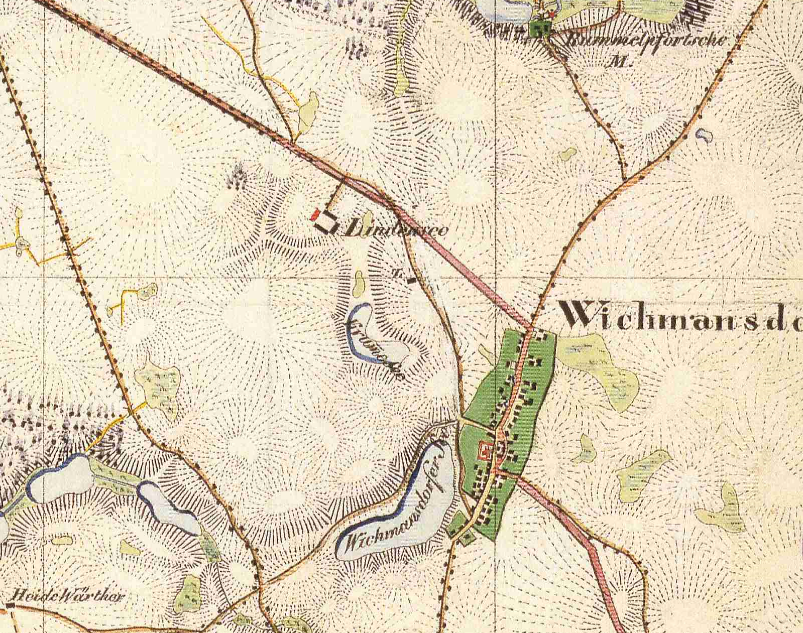 Wichmannsdorf, mit den Wohnplätzen Lindensee und Rummelpforter Mühle, Gemeinde Boitzenburger Land, Lkr. Uckermark, Brandenburg, Ausschnitt aus dem Urmesstischblatt 2747 Boitzenburg von 1825